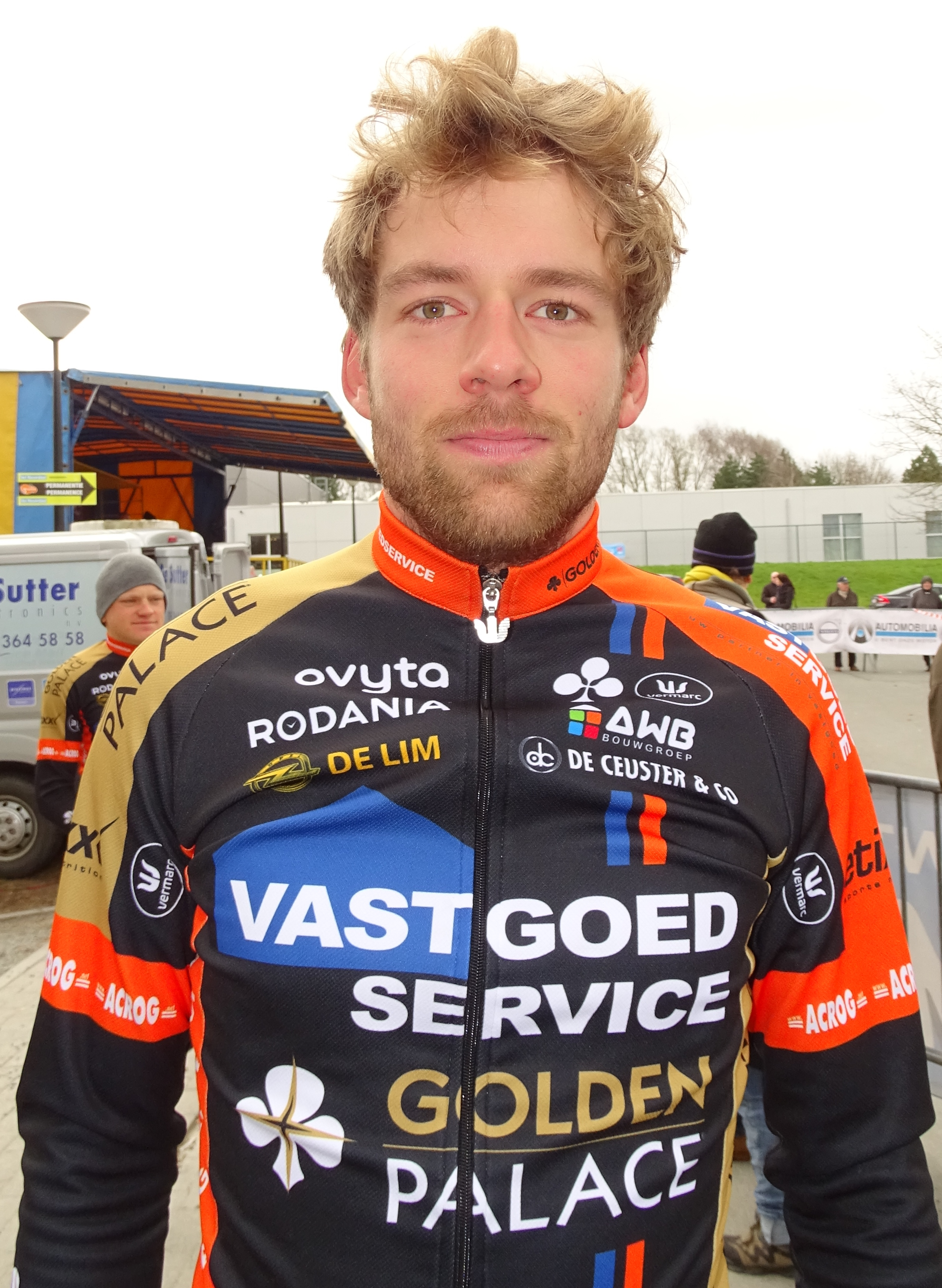 Reportage réalisé le mercredi 1er avril à l'occasion du départ de la deuxième étape des Trois jours de La Panne 2015 à Zottegem, Belgique.